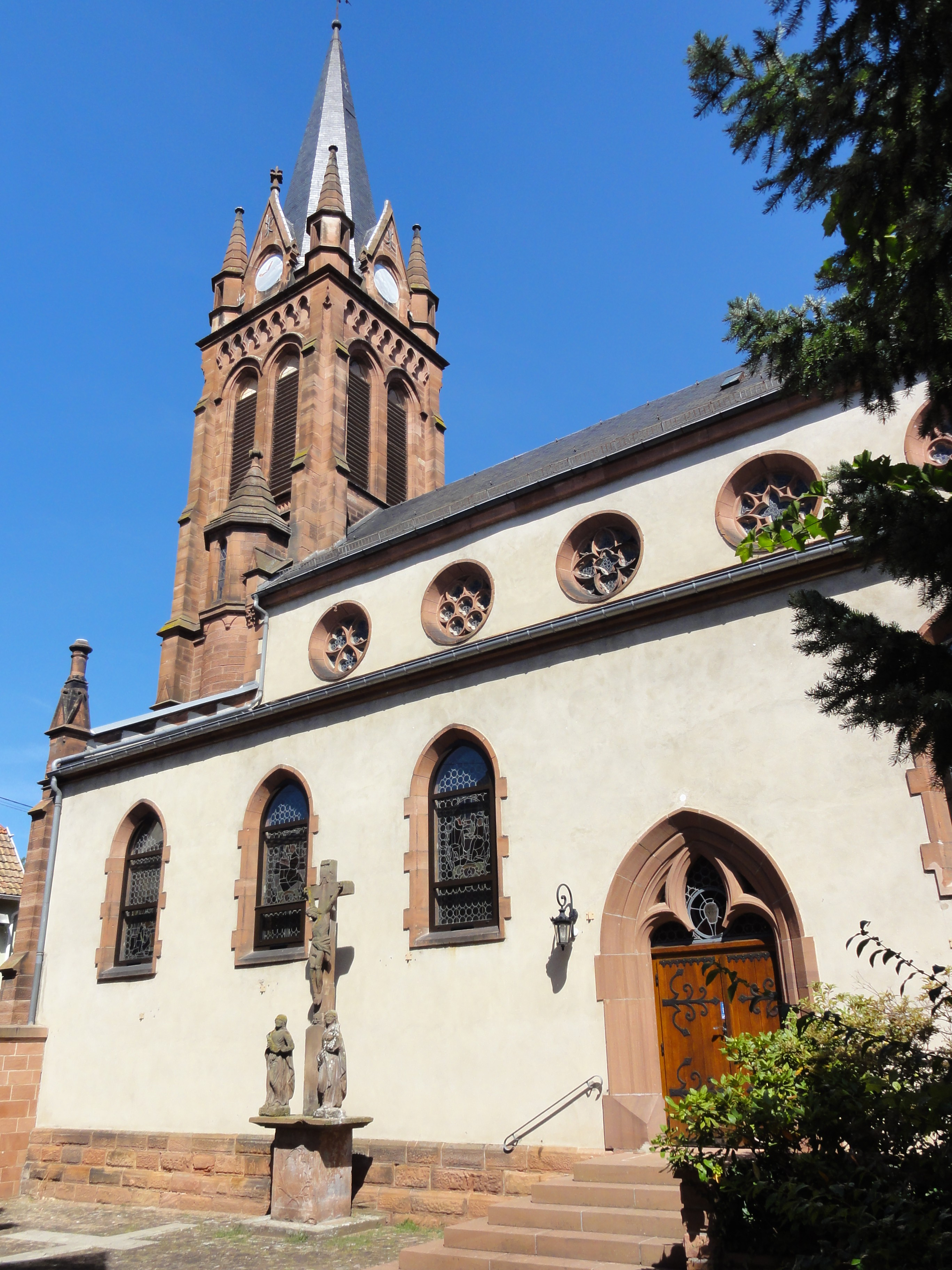 Alsace, Bas-Rhin, Pfaffenhoffen, Église catholique Saints-Pierre-et-Paul (IA67010131).